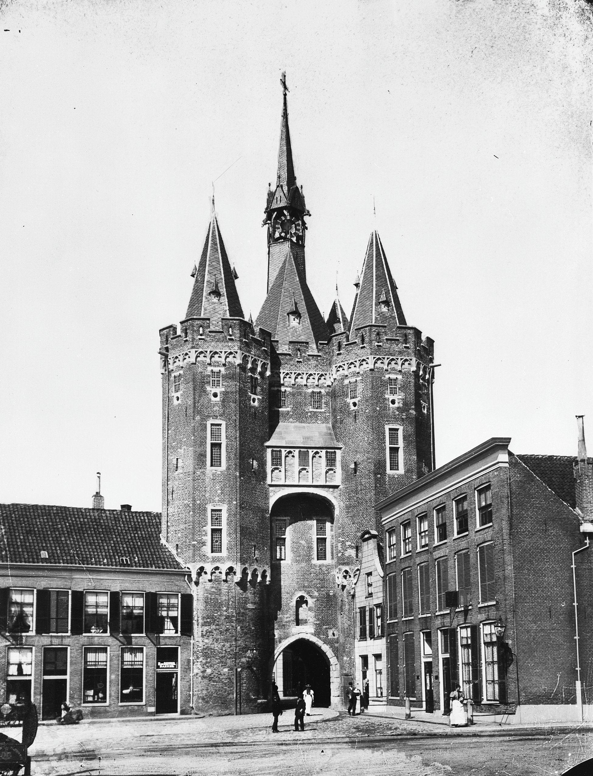 Sassenpoort, exterieur